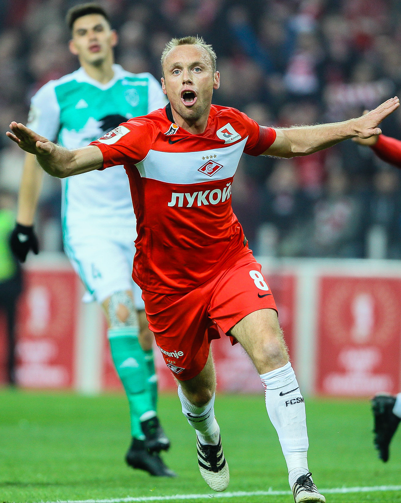 «Спартак» - «Терек»